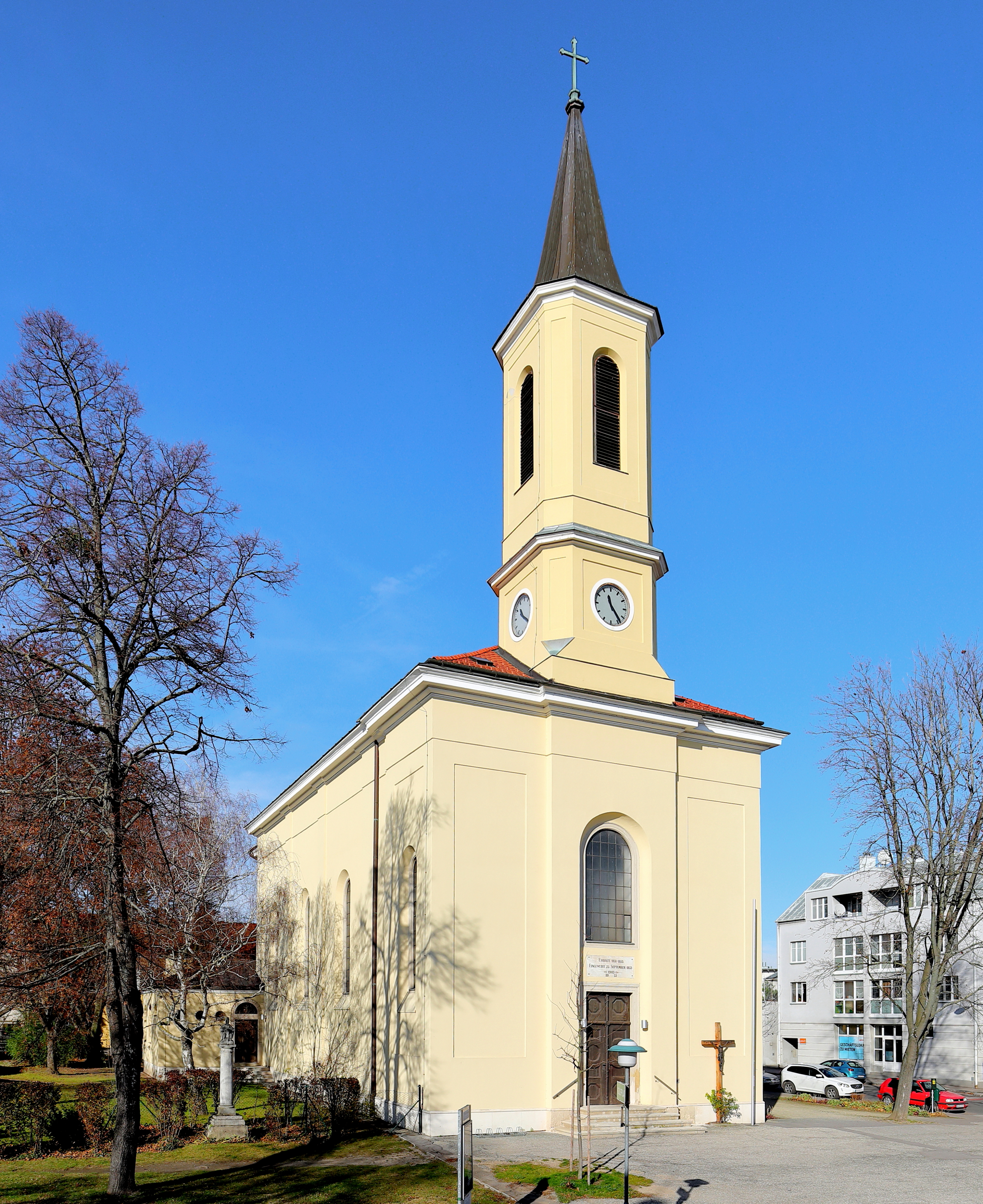 Südostansicht der röm.-kath. Pfarrkirche Maria Himmelfahrt in der niederösterreichischen Gemeinde Ebergassing. Die Saalkirche mit zweigeschossigem Fassadenturm und einem quadratischen Chorschluss wurde ab 1851 errichtet und am 25. September 1853 geweiht.